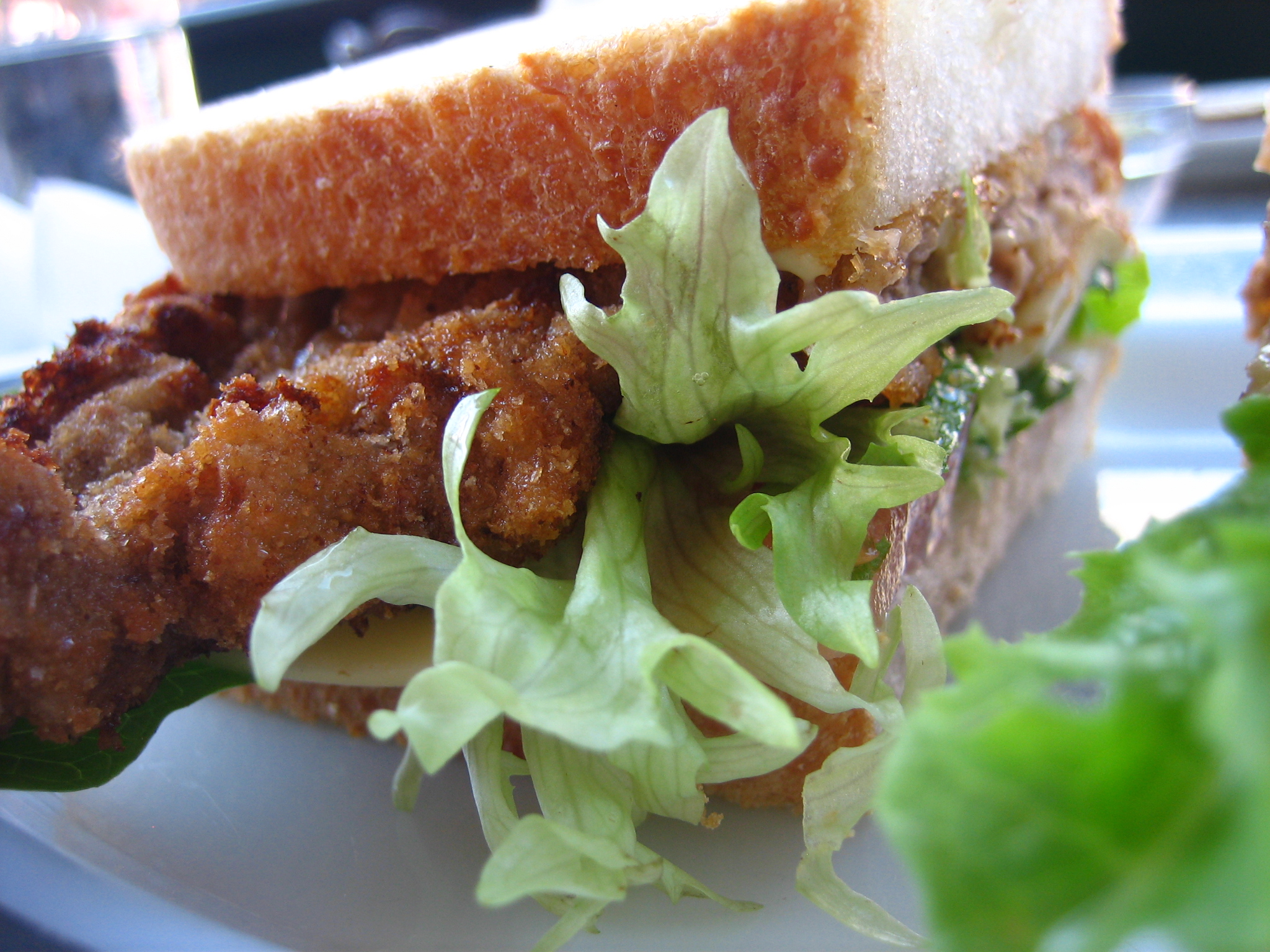 A schnitzel sandwich.